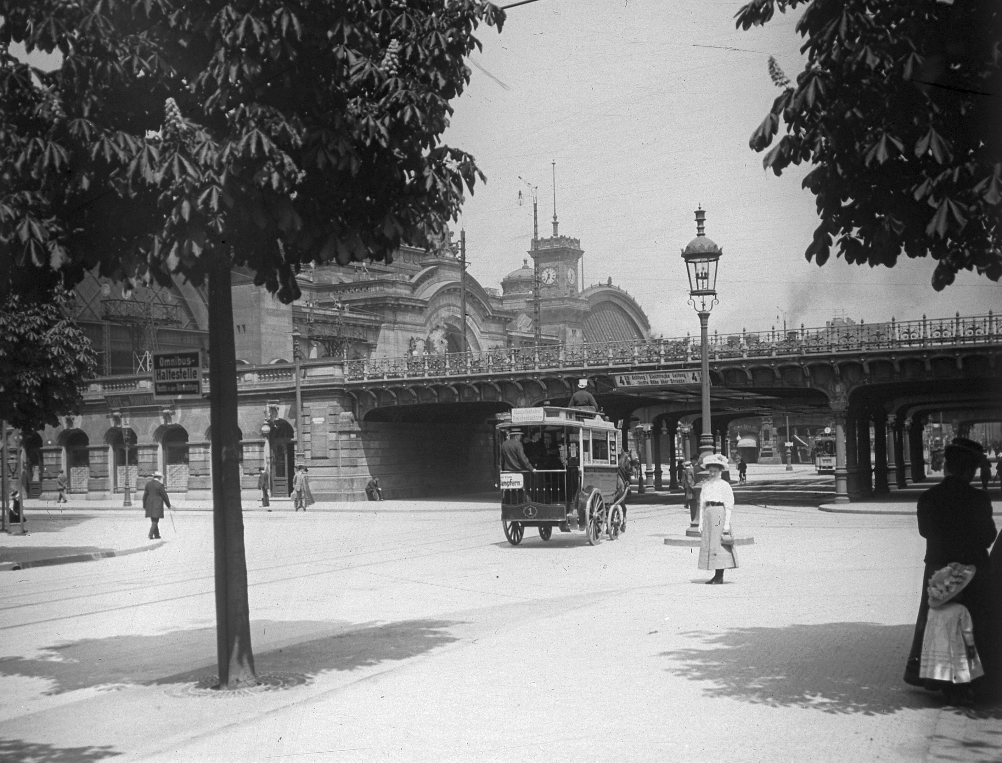 Főpályaudvar a Bayrische Strasse felől. Location: Germany, Dresden Tags: omnibus Title: Főpályaudvar a Bayrische Strasse felől.